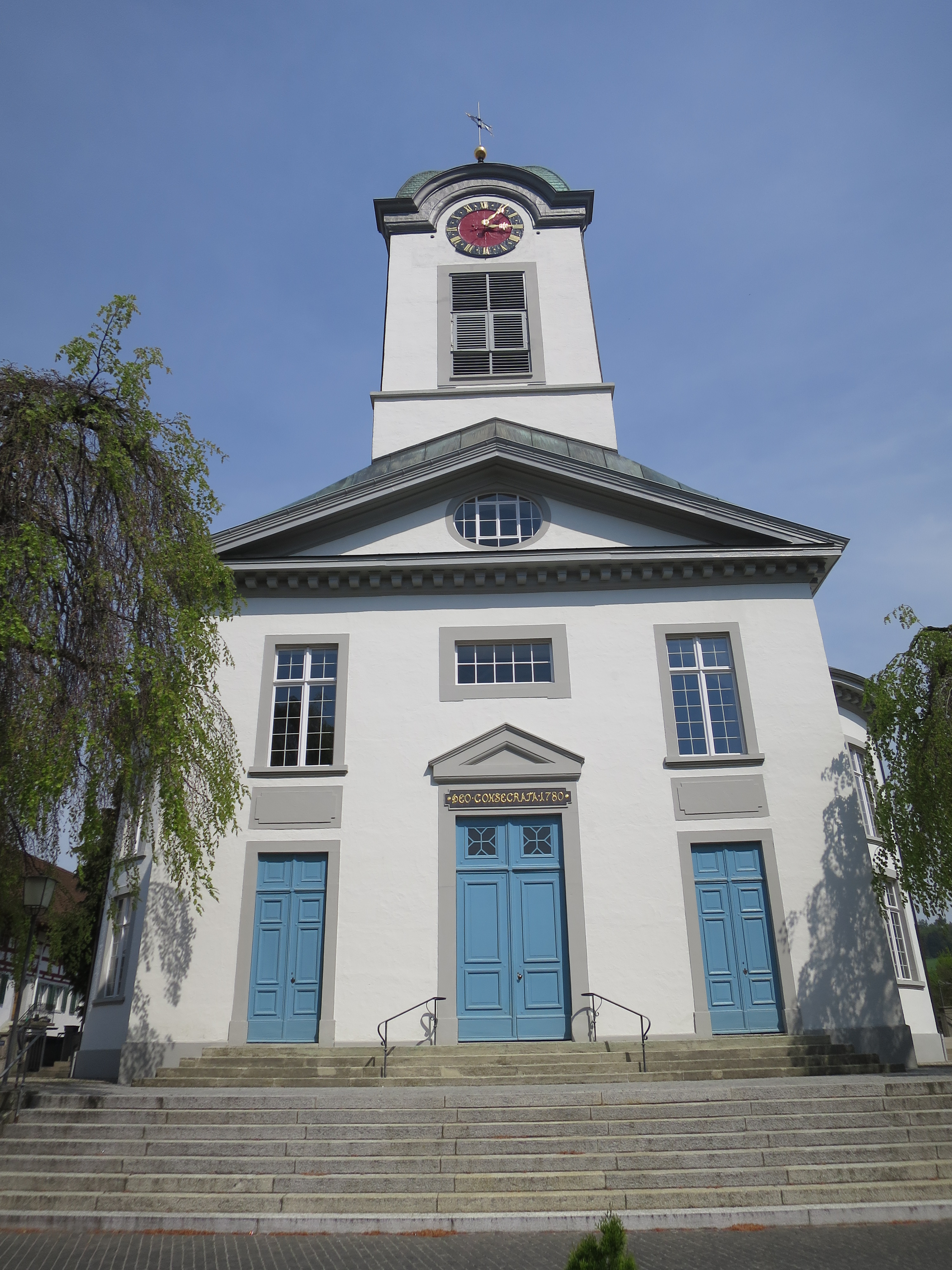 Ansicht der reformierten Kirche Embrach